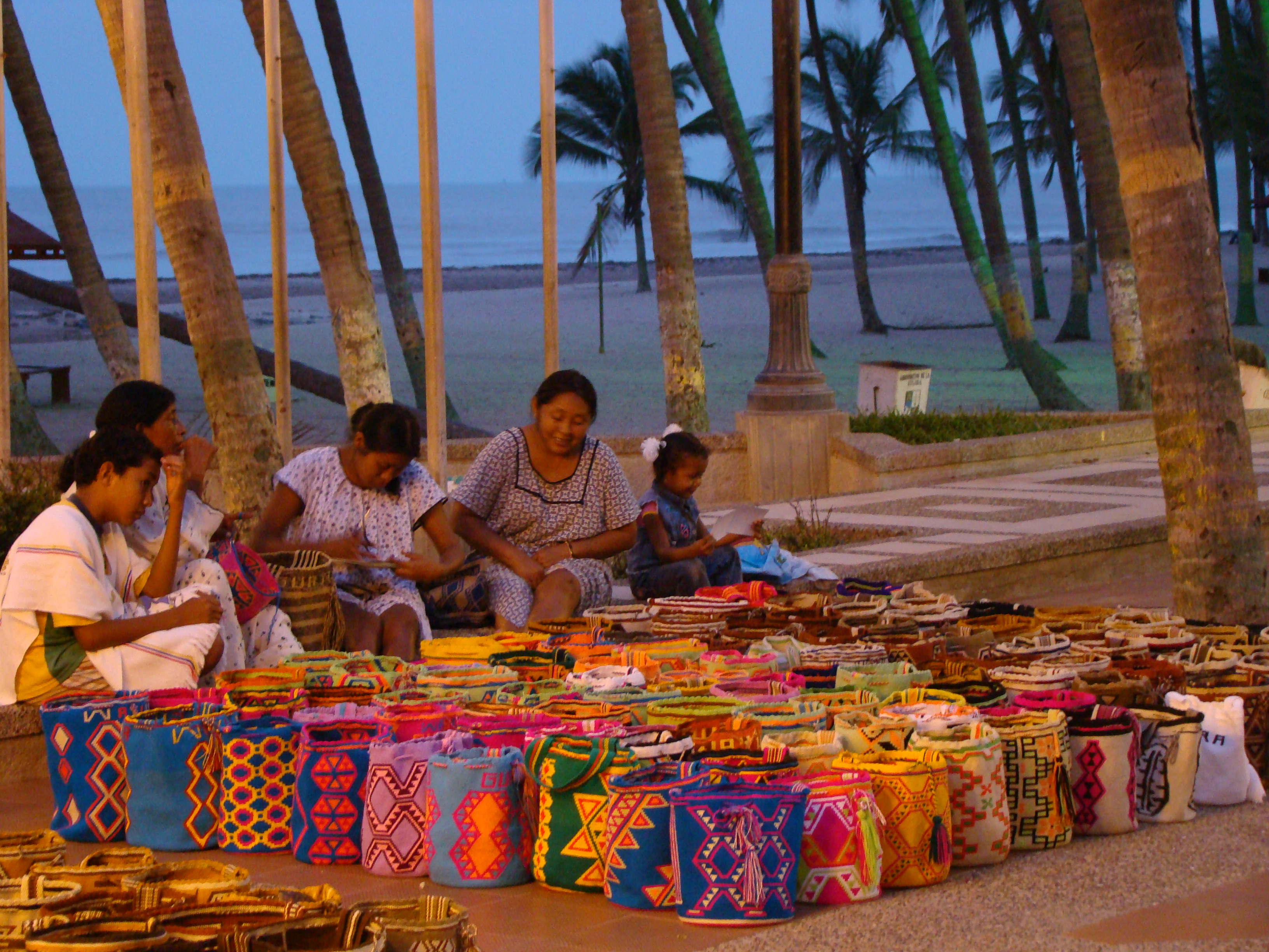 Indígenas Wayuu, tejedoras de mochilas en el Camellón de Riohacha